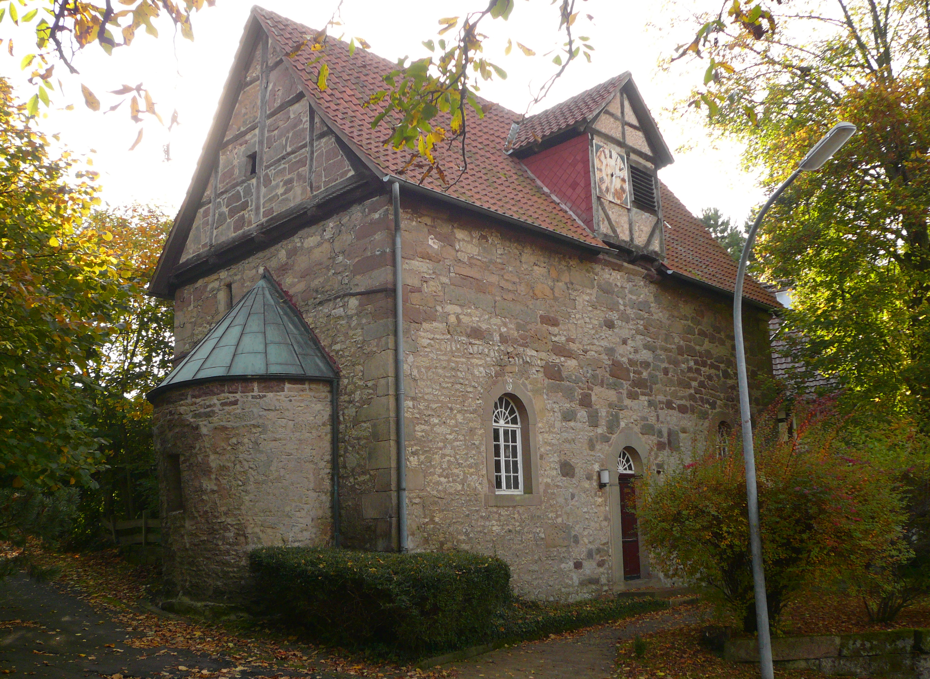 Ehemalige Burgkapelle in Wibbecke, Flecken Adelebsen, Landkreis Göttingen, Niedersachsen. Erbaut ab 1150, erweitert im 13. Jhdt.